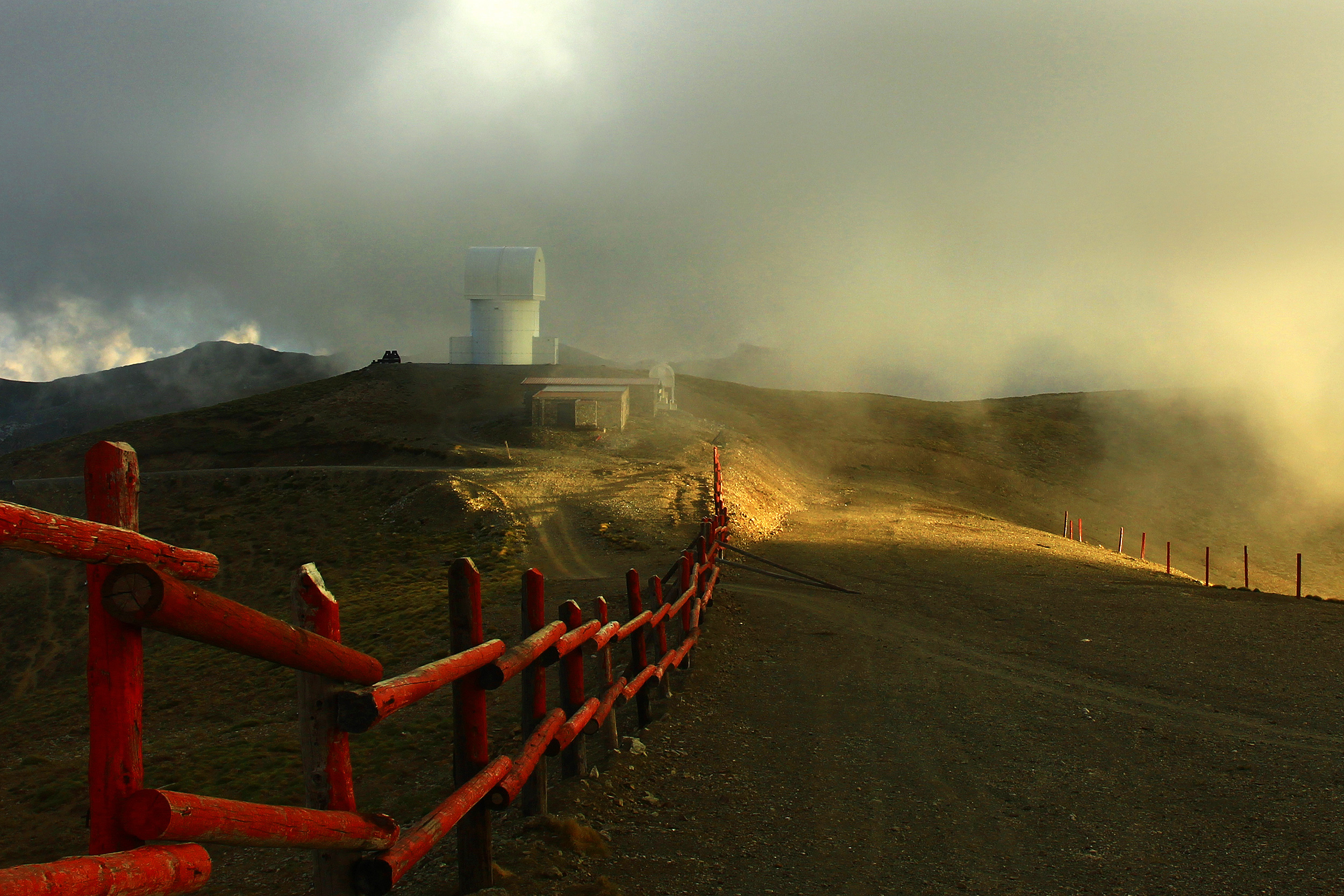 Το αστεροσκοπείο στην κορυφή του όρους Χελμός This is a photography of Natura 2000 protected area with ID GR2320002